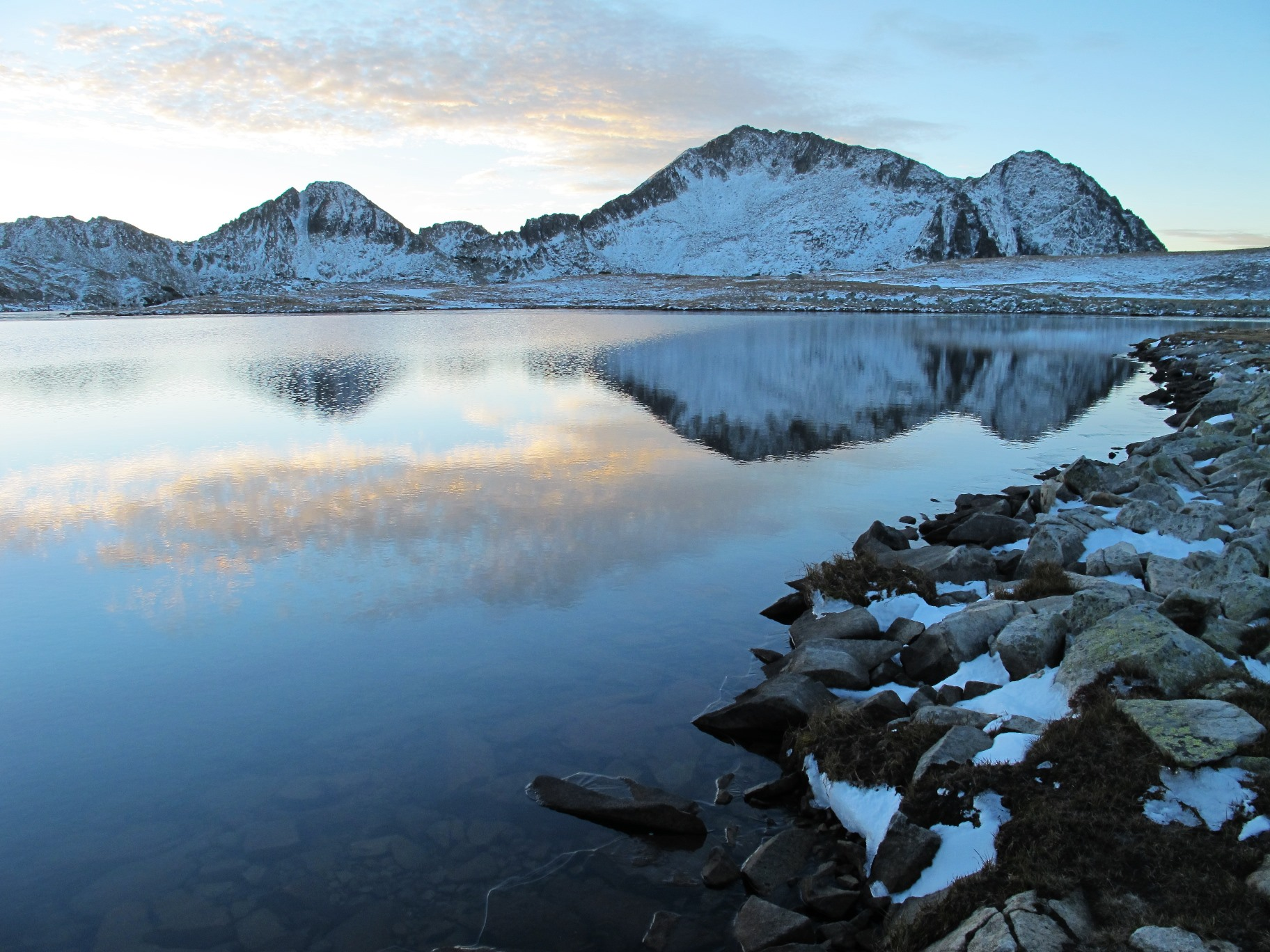 Пирин, Пирин